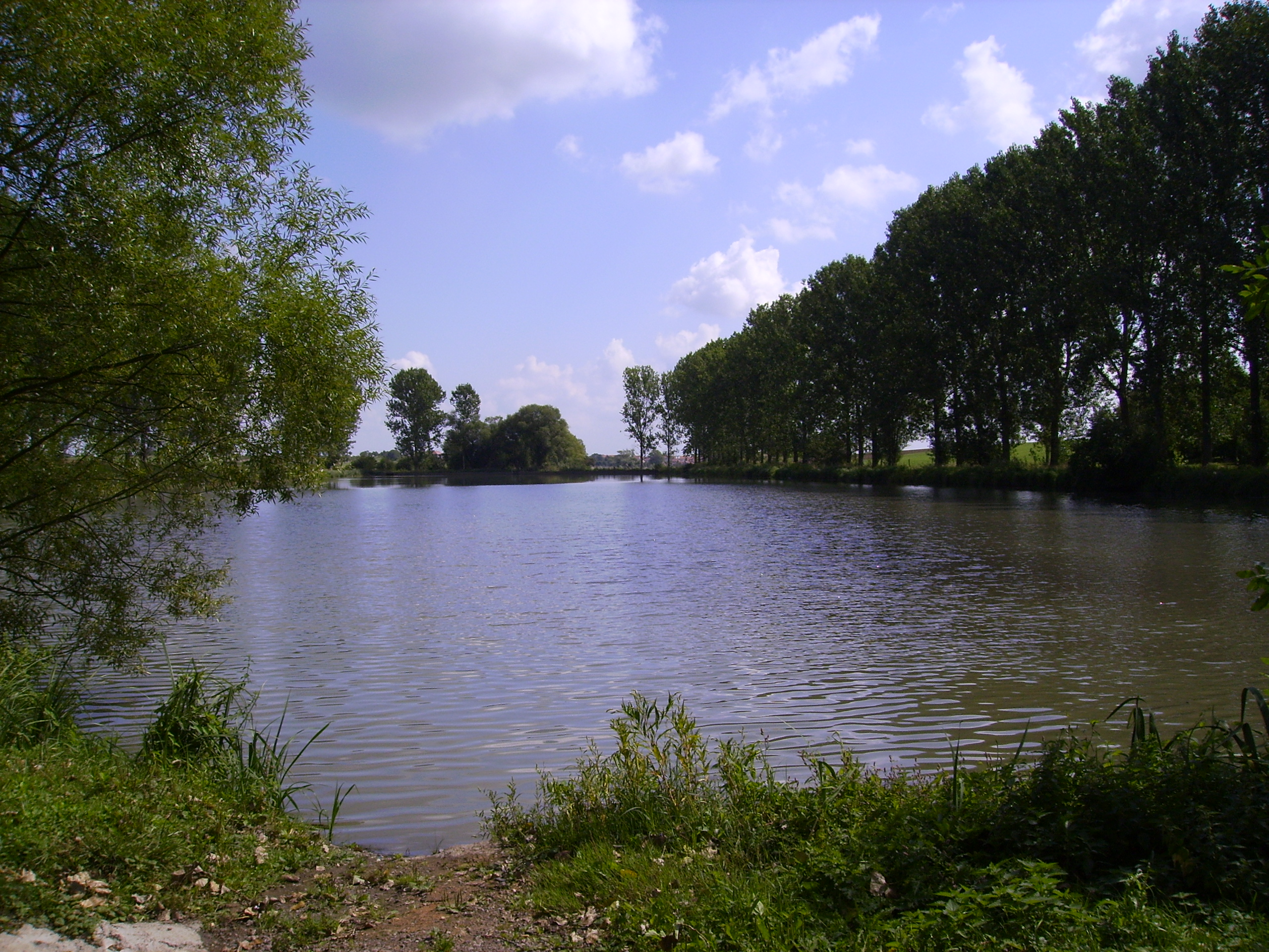 Lac de la Tensch en Lorraine